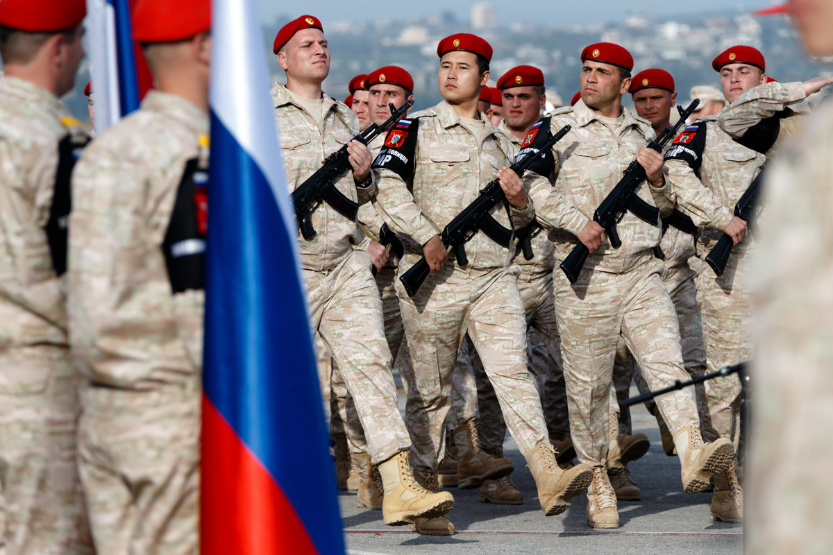 Во время посещения Президентом России Владимиром Путиным авиабазы Хмеймим в Сирии.